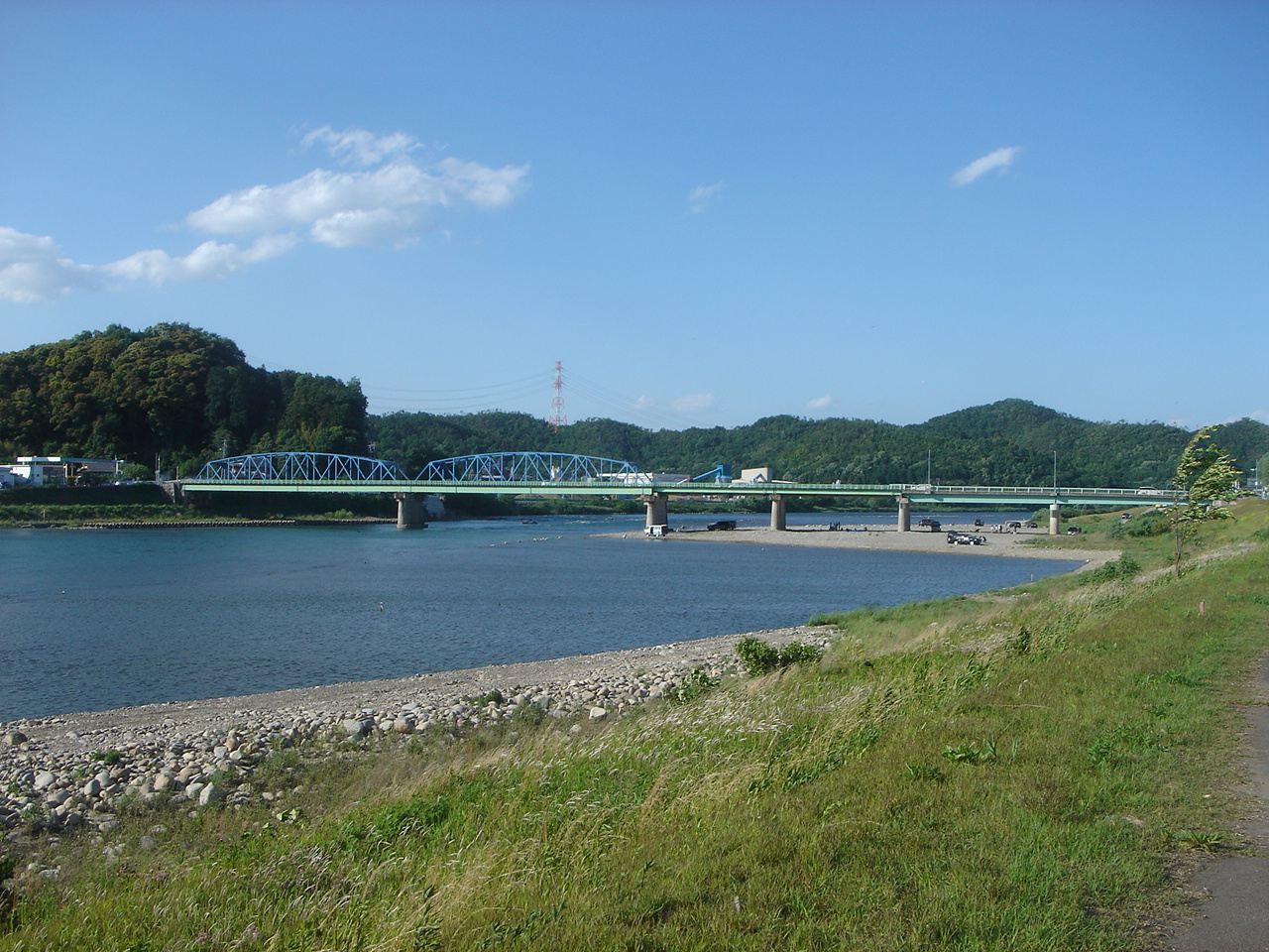 Senbiki Ohashi(千疋大橋),Seki,Gifu,Japan(岐阜県関市)で南(下流)より撮影。川は長良川